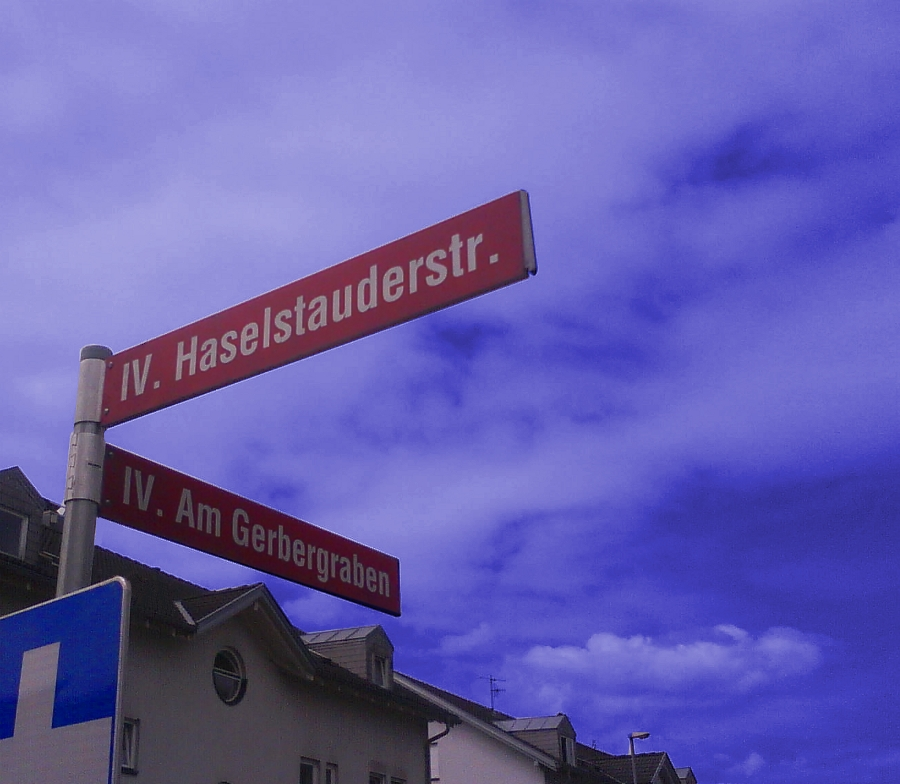 Ein Straßenschild in Haselstauden.